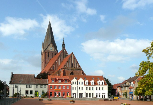 Barth: Blick zur Marienkirche